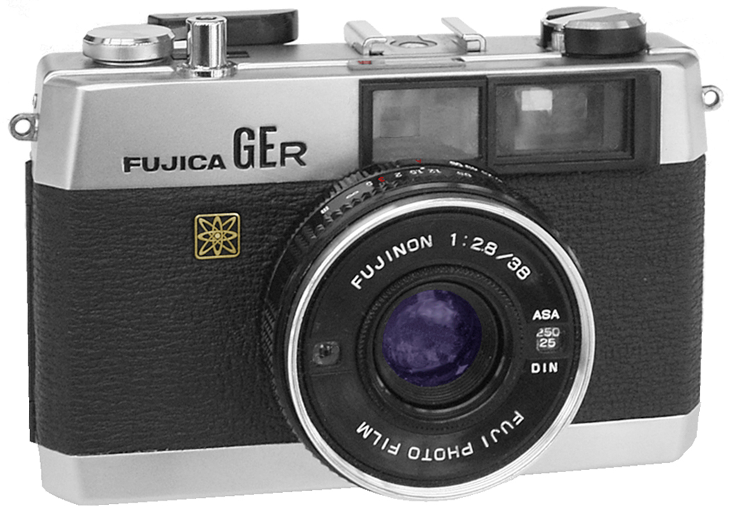 Fast jeder namhafte Kamerahersteller hatte sie in den 70ern im Programm: die kompakten Entfernungsmesser-Sucherkameras mit der Verschluss-/Blenden-Kombination aus 2 Lamellen von Copal (wie bei der Konica C35) oder Seiko (wie bei der Olympus 35 ECR). Auch das Objektiv schien bei fast allen vom selben Hersteller zu sein: ein Vierlinser (Tessar-Typ) 2,7/38 mm. Von Fuji kam diese Fujica GER mit dem Seiko-ESF-Verschluss, der von 2 Sek./Blende 2,8 bis 1/800 Sek./Blende 13 ging. Wie bei dieser Verschlussart üblich, kann man nicht beliebige Zeit-/Blenden-Kombinationen einstellen: Jedem Blendenwert ist eine bestimmte Verschlusszeit zugeordnet und umgekehrt. Im Gegensatz zum Copal-Verschluss werden beim Seiko dieser Fujica keine Werte im Sucher angezeigt, nur ein orange Signal im Sucher meldet beim Drücken des Auslösers Aufnahmebereitschaft. Bei längeren Zeiten bleibt das Licht so lange an, wie der Verschluss geöffnet ist. Wie die meisten dieser Kompakten hatte auch die Fujica das Flashmatic-System zum Blitzen: Nach Einstellen der Leitzahl am Objektiv und aufgesetztem Blitzgerät richtet sich die Blende automatisch nach der eingestellten Entfernung. Ein Problem sind die nicht mehr erhältlichen dicken 640er Quecksilber-Batterien, von denen man 2 Stück zu je 1,35 Volt benötigt hat. Es gibt aber "legale" Nachfolger, die in der Größe (doppelt so dick wie "normal"!), aber nicht in der Spannung passen: Ein Negativ-Film verkraftet die Abweichung. Eine andere Möglichkeit ist folgender Adapter: In den kann man die verfügbaren SR44 (1,55 V, Silberoxid), LR44 (Alkaline, 1,5 V) oder die 675er Hörgeratebatterien reintun. Letztere sind sehr günstig, haben sogar passende 1,4 V, aber halten nicht so lang. Die dritte Möglichkeit: Man füllt ein Fach mit zwei dieser Batterien: Das andere Fach wird überbrückt - zur Not mit Alufolie.